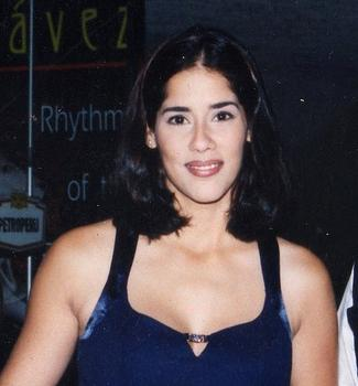 The Peruvian actress and model Gianella Neyra in 1999 / Tras participar como extras –creo que era la cinta Imposible amor-, Anngie Caballero y yo nos tomamos una foto con Gianella Neyra. (1999)